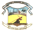 Escudo del municipio Bolivar. Estado Monagas. Venezuela